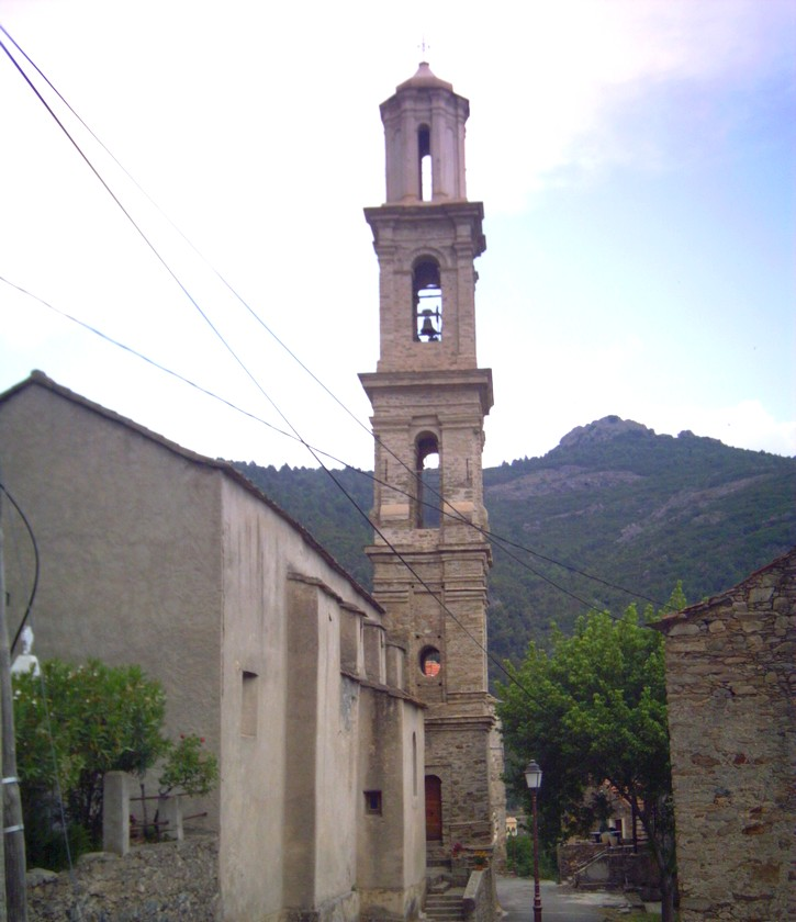 Le clocher de l'église de Lugo-di-Nazza (5 niveaux).